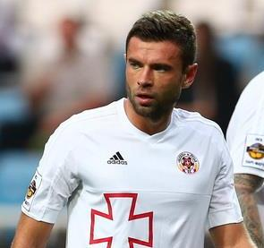 Дмитро Козьбан - футболіст Волині